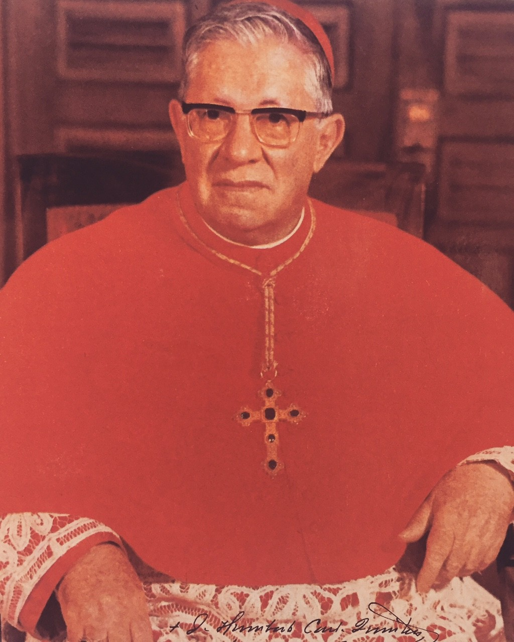 José Humberto Quintero (1902-1984), primer Cardenal de Venezuela.